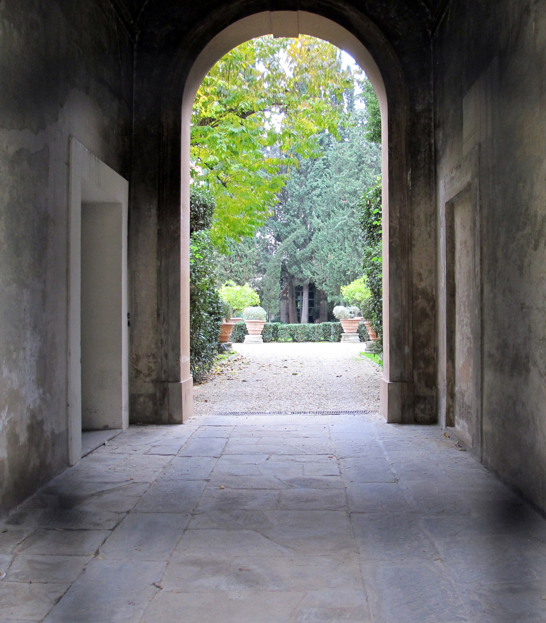 Palazzo del pugliese, giardini